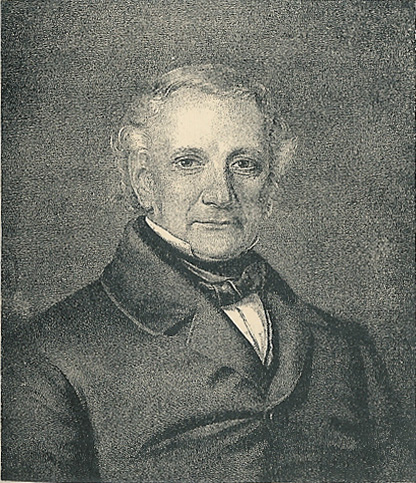 Carl Andreas Reitzel. Fra P. Hansens Illustreret Litteraturhistorie bind 2, Anden meget forøgede udgave, 1902.